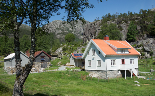 Våningshus, Bakken fjellgard, Lysefjorden i Ryfylket